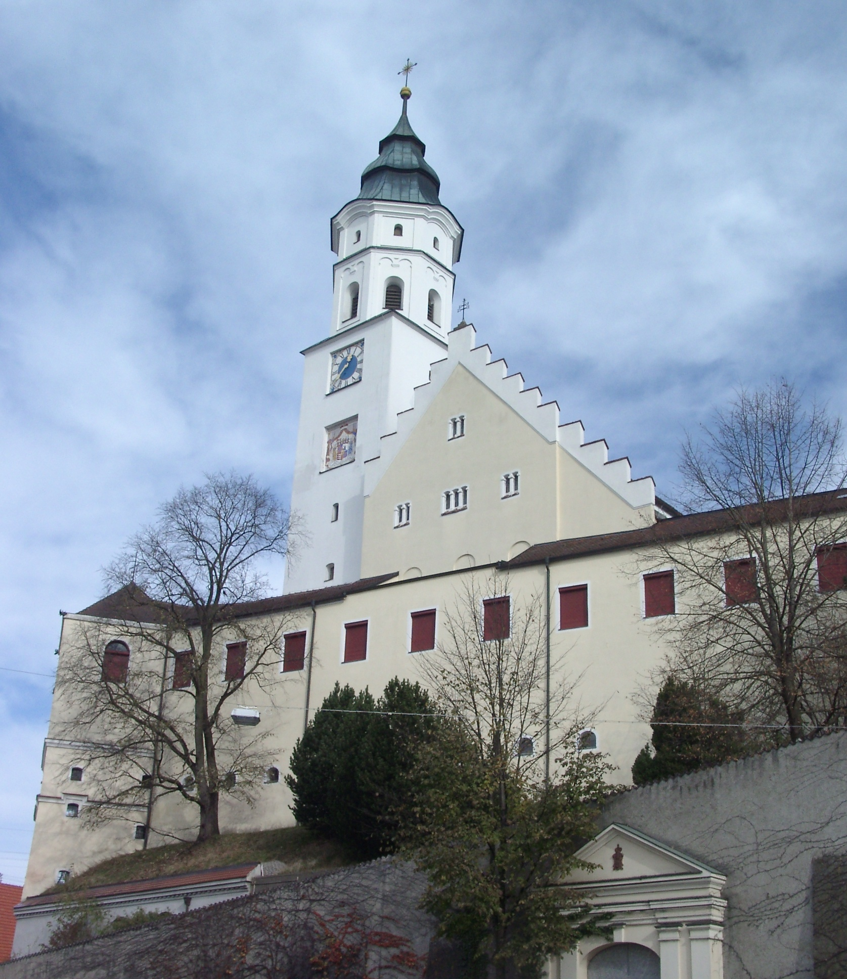 Babenhausen (Schwaben) Pfarrkirche St. Andreas mit Fuggerschloss